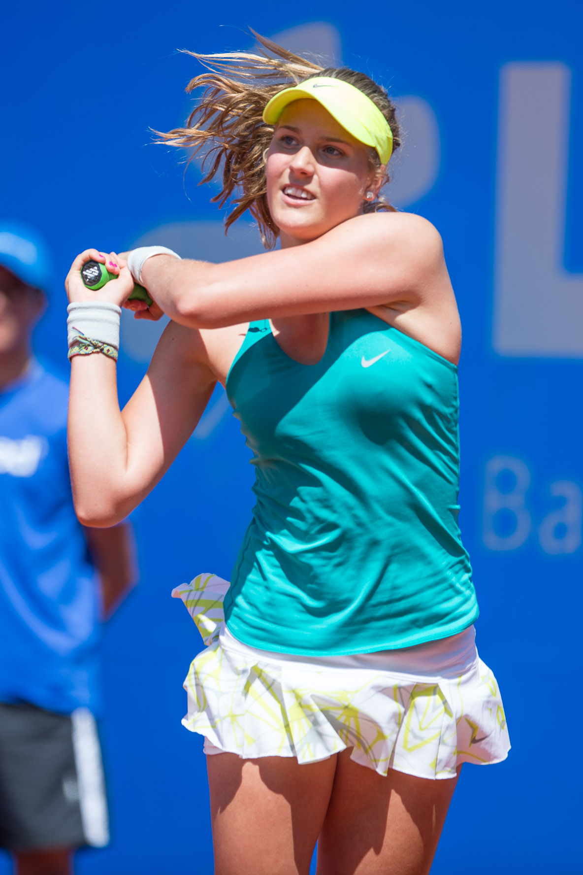 Antonia Lottner,Damentennis,Nürnberger Versicherungscup 2014,Tennis,WTA